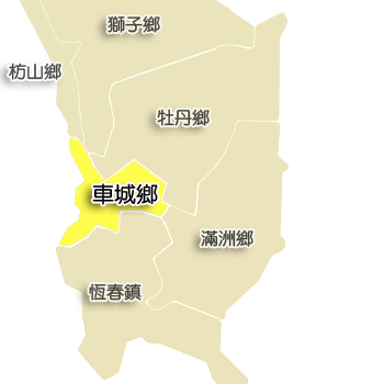 屏東縣車城鄉相對位置。